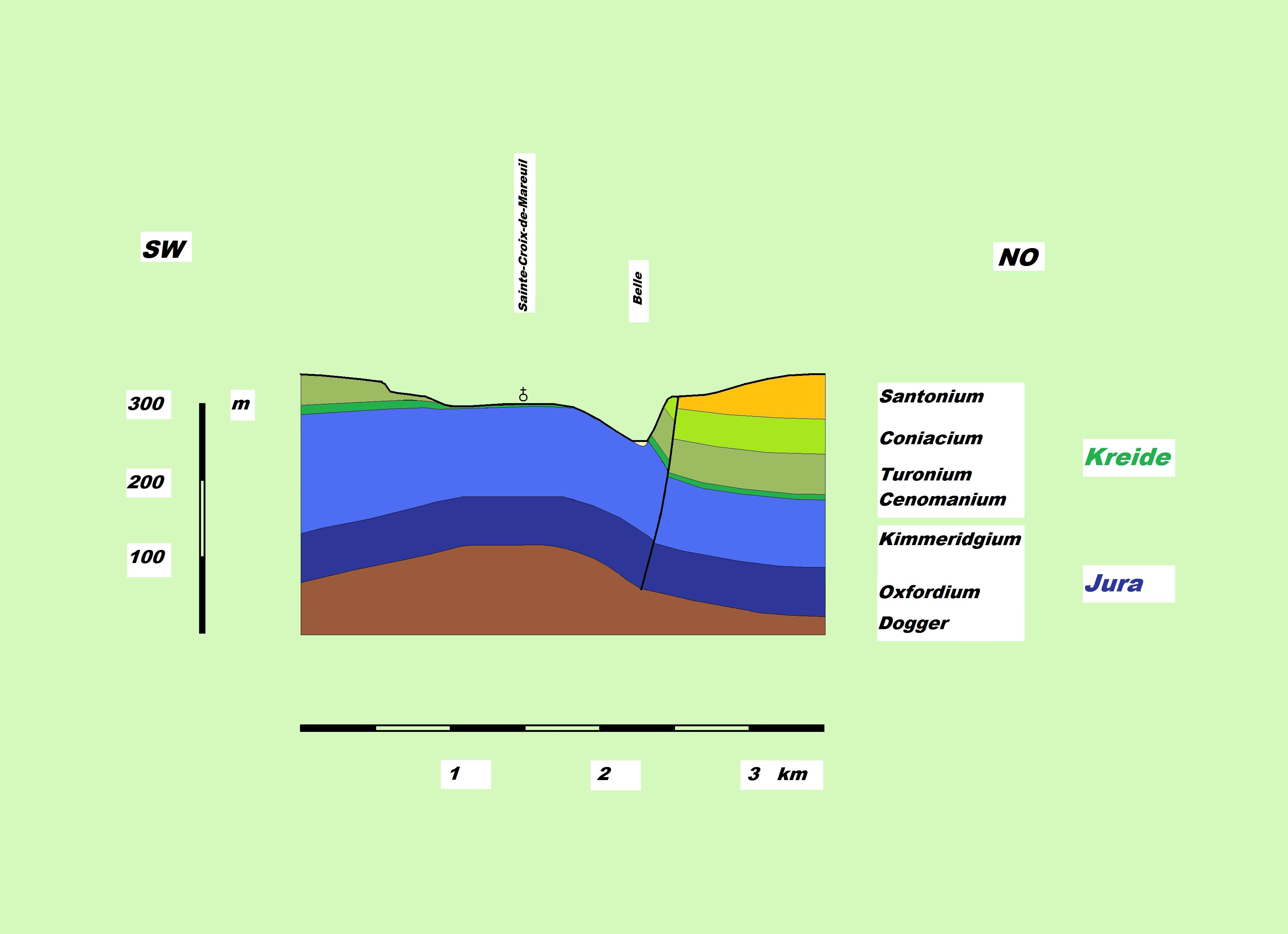 Profilschnitt durch die Mareuil-Antiklinale, nordöstliches Aquitanisches Becken, Frankreich. Das Profil ist stark überhöht.